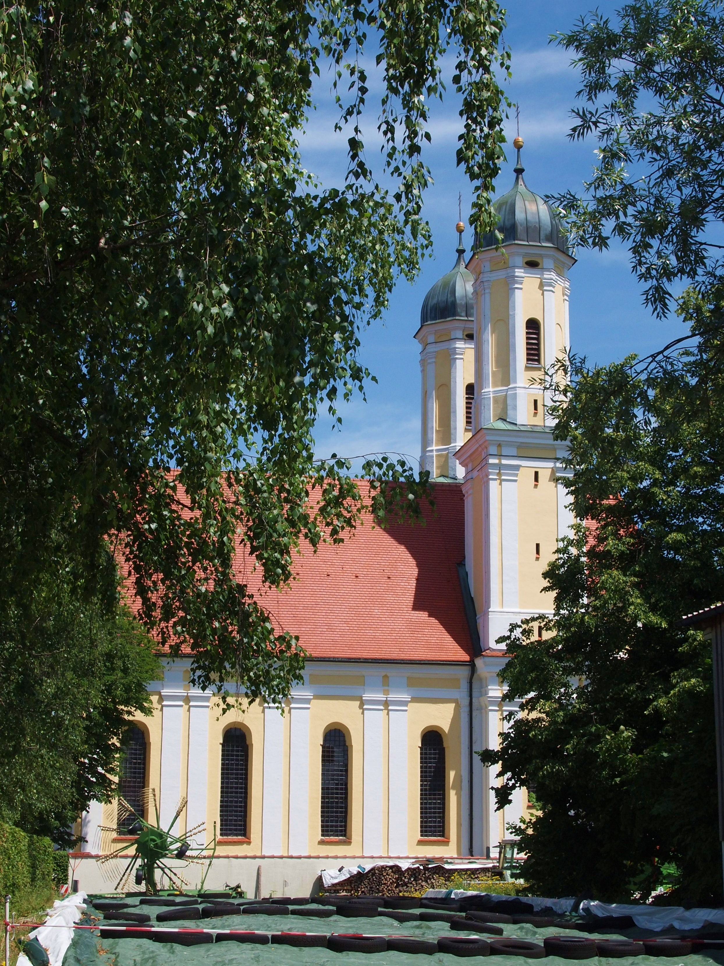 Obergermaringen, Landkreis Ostallgäu, Wallfahrtskirche St. Wendelin, Kaufbeurer Straße 17